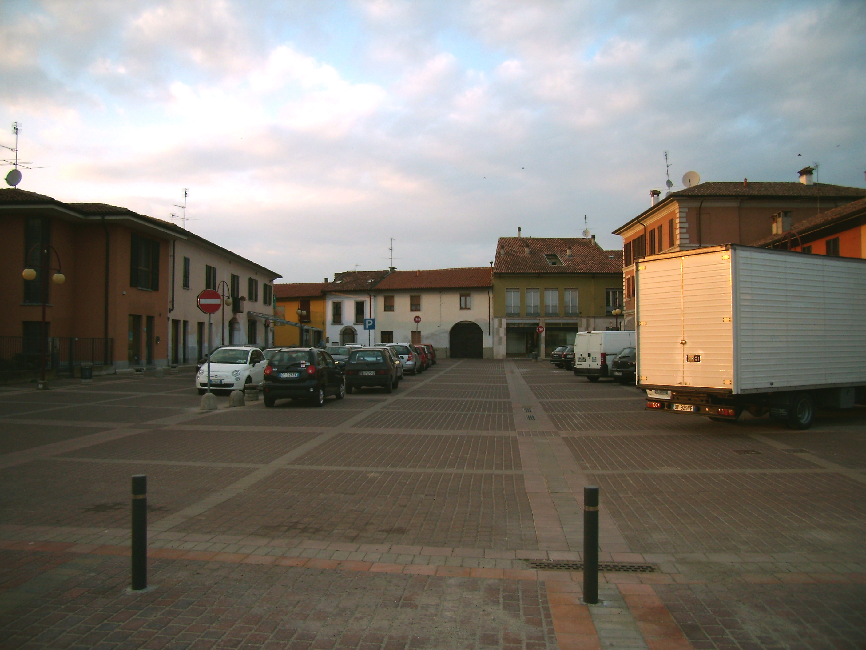 Piazza Santa Maria (antico Foro romano) a Lodi Vecchio.